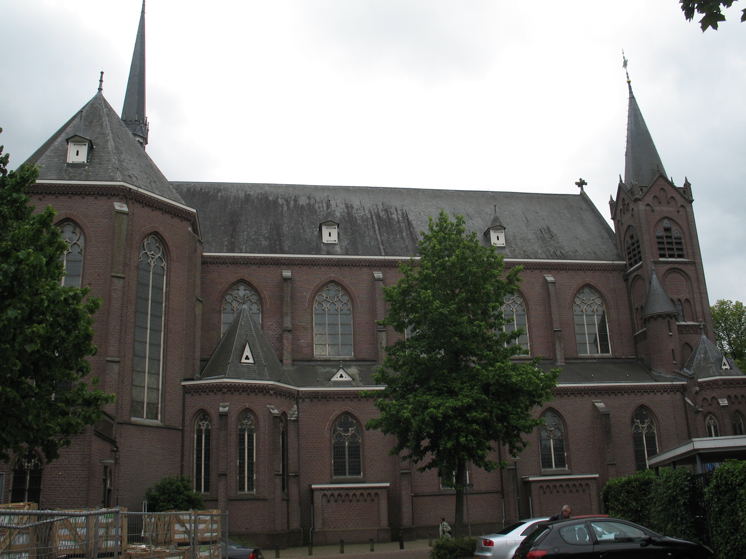 Kerk van Sint Oedenrode